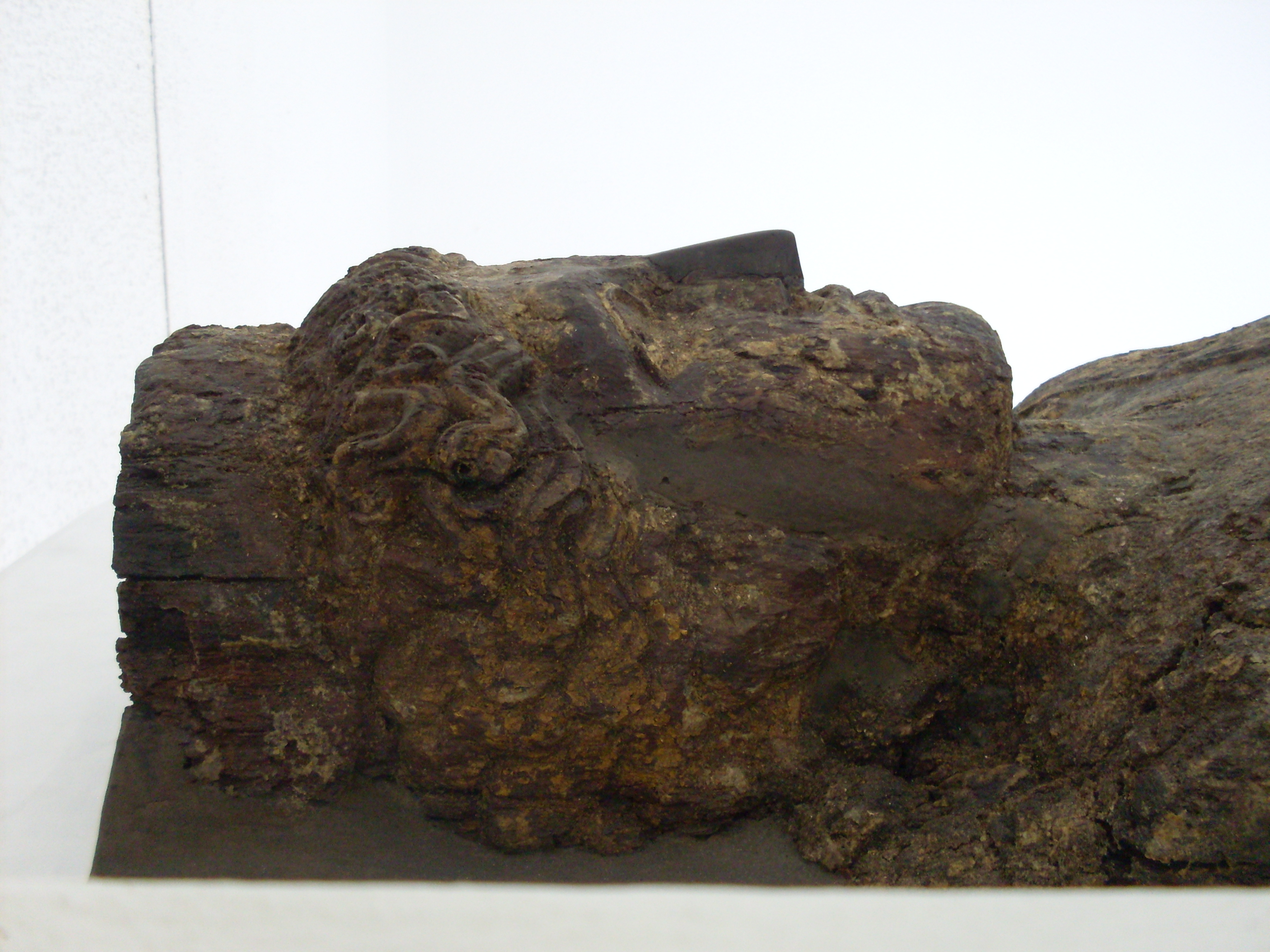 sarcophage en bois d'une princesse